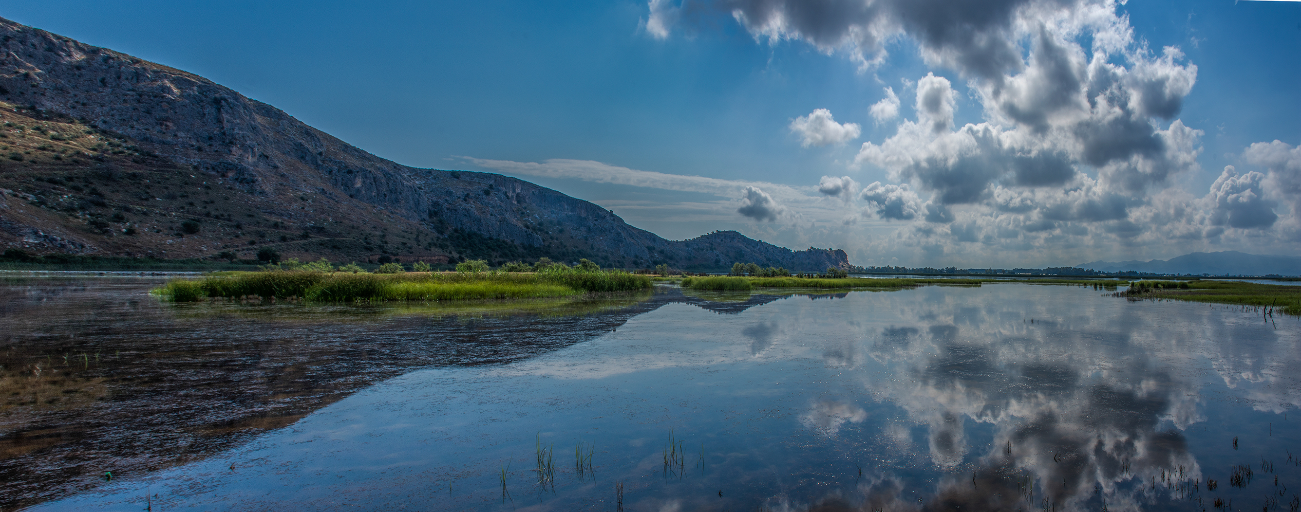 Λιμνοθάλασσα Καλογριάς This is a photography of Natura 2000 protected area with ID GR2320001